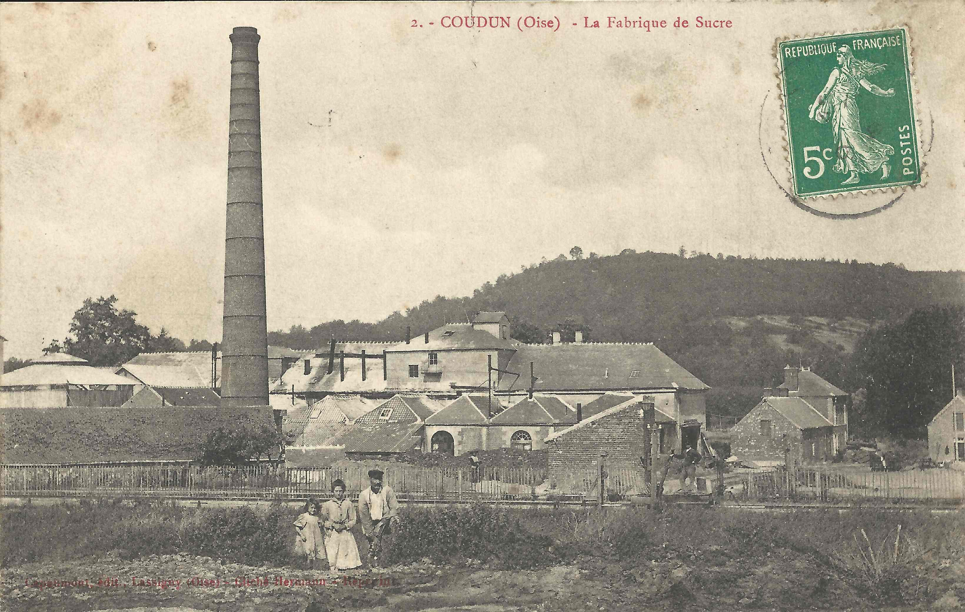 Carte postale - 1900